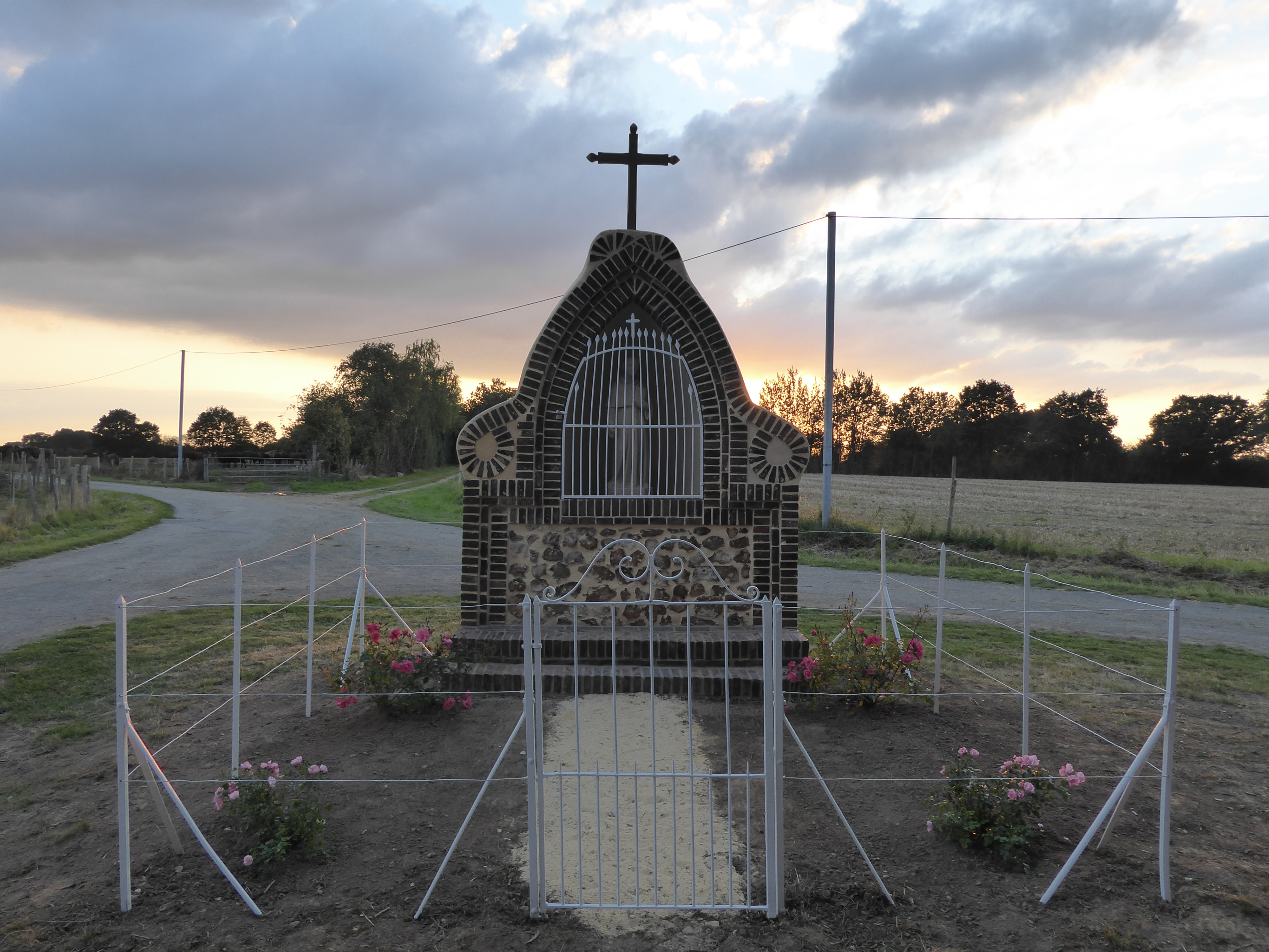 Oratoire de Saint-Laumer, sur la commune du Pas-Saint-L'Homer, dans l'Orne.